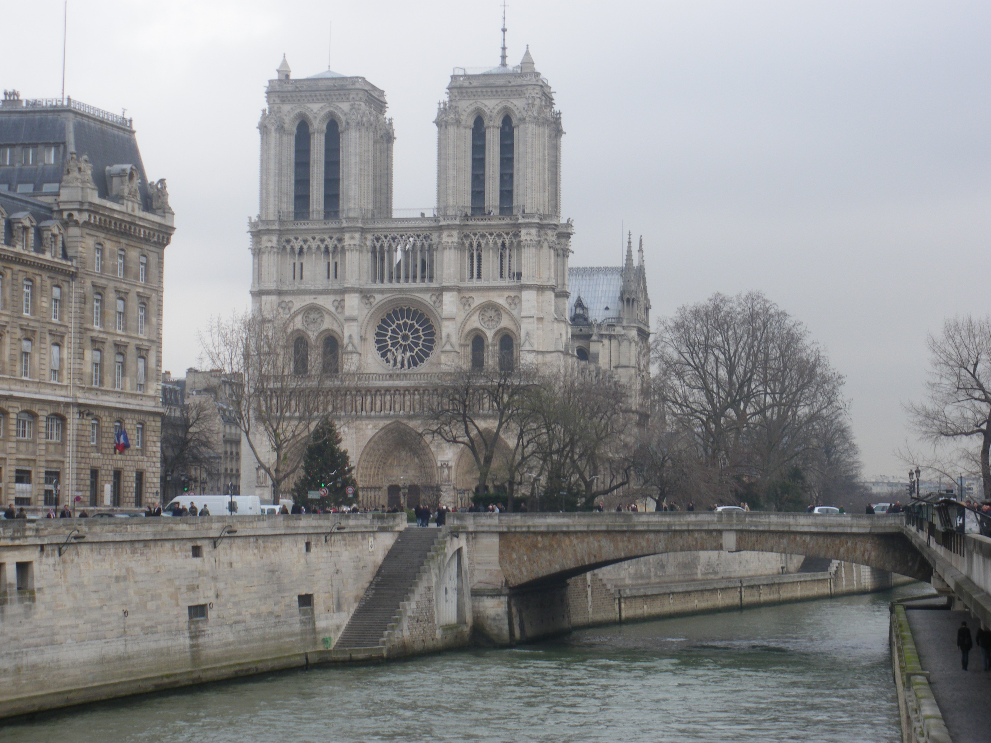 Notre Dame de Paris, France